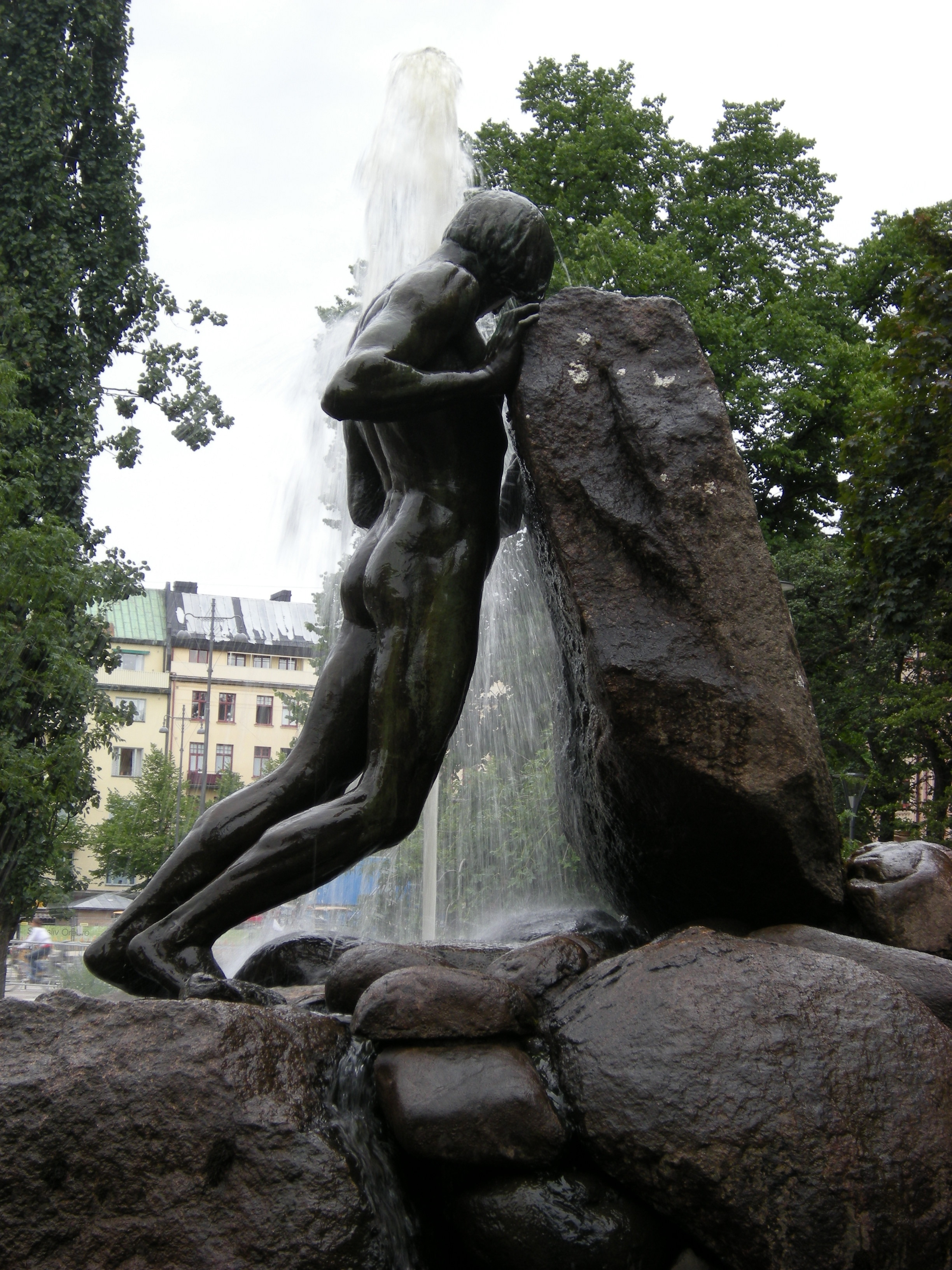 Befriaren, 1914, av Karl Hultström (1884-1973), skänkt av grosshandlaren Adolf Lindgren. Örebro.